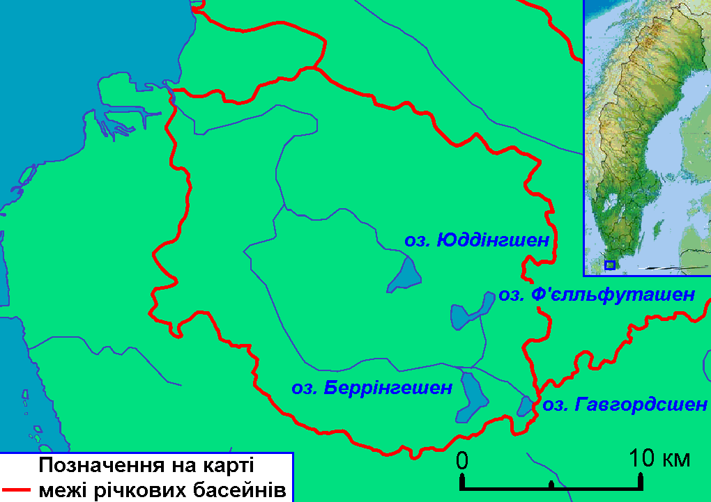 Карта річки Сеге на півдні Швеції у лені Сконе. Створено на основі карти річок лену Сконе Skåne län на сайті SMHI Шведського інституту метеорології та гідрології. Використано карту File:Sweden relief location map.jpg.